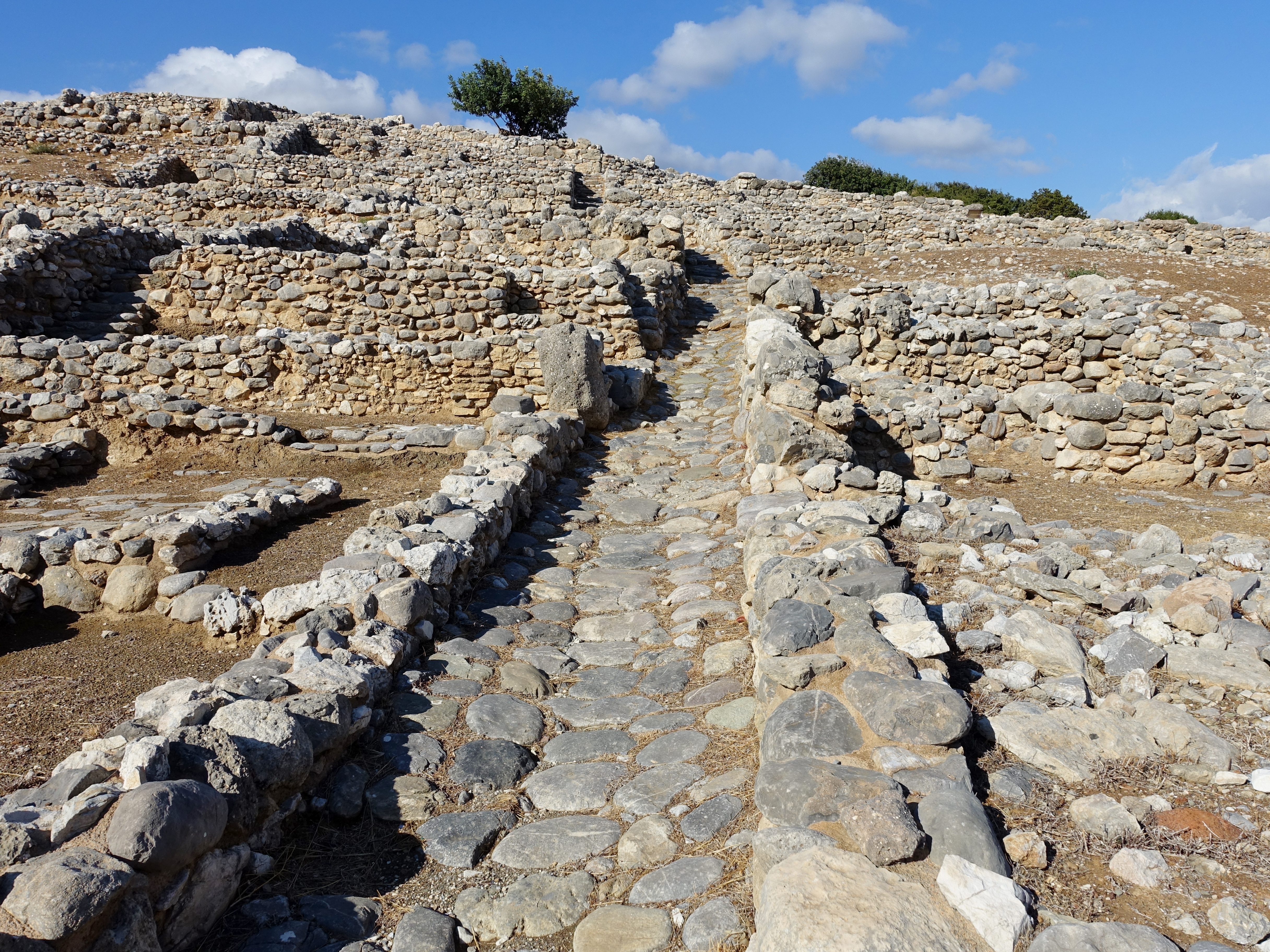 Ausgrabungsstätte von Gournia (Γουρνιά) bei Pachia Ammos (Παχειά Άμμος), Gemeinde Ierapetra, Kreta, Griechenland